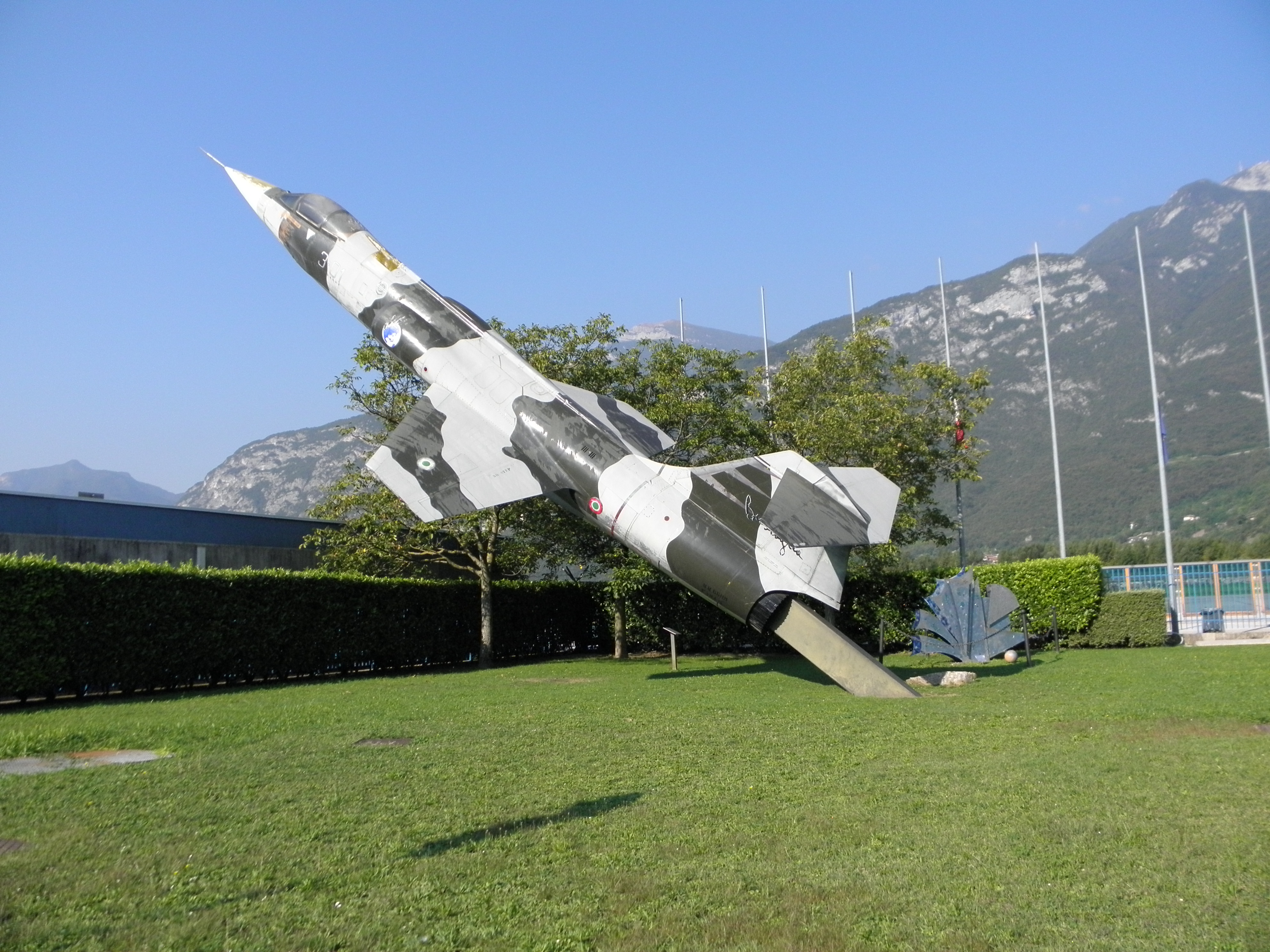 Trento, aeroporto di Trento-Mattarello "Gianni Caproni". L'F-104G monumentato "Gate Guardian" del complesso.